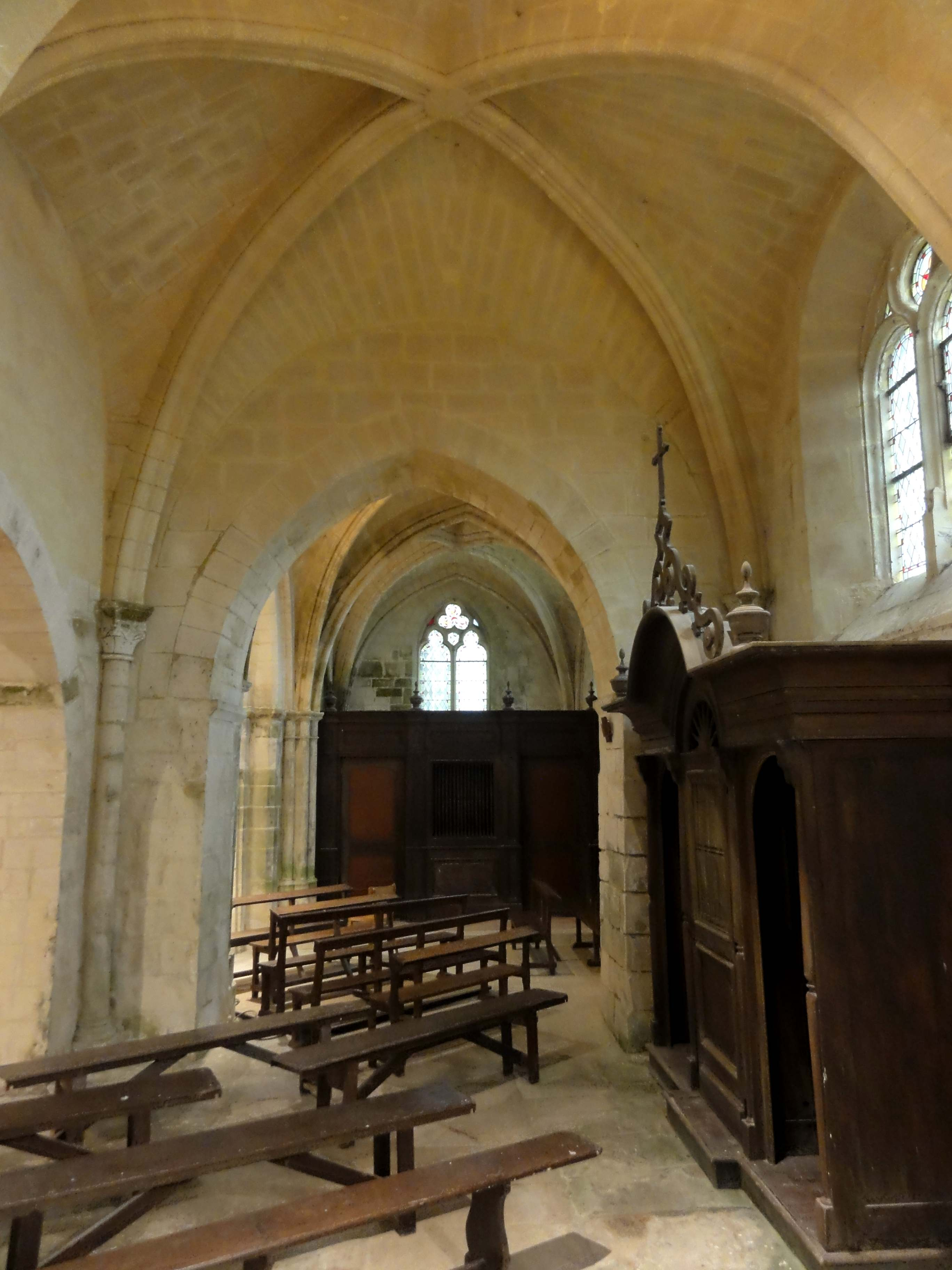 Intérieur de l'église - voir titre.